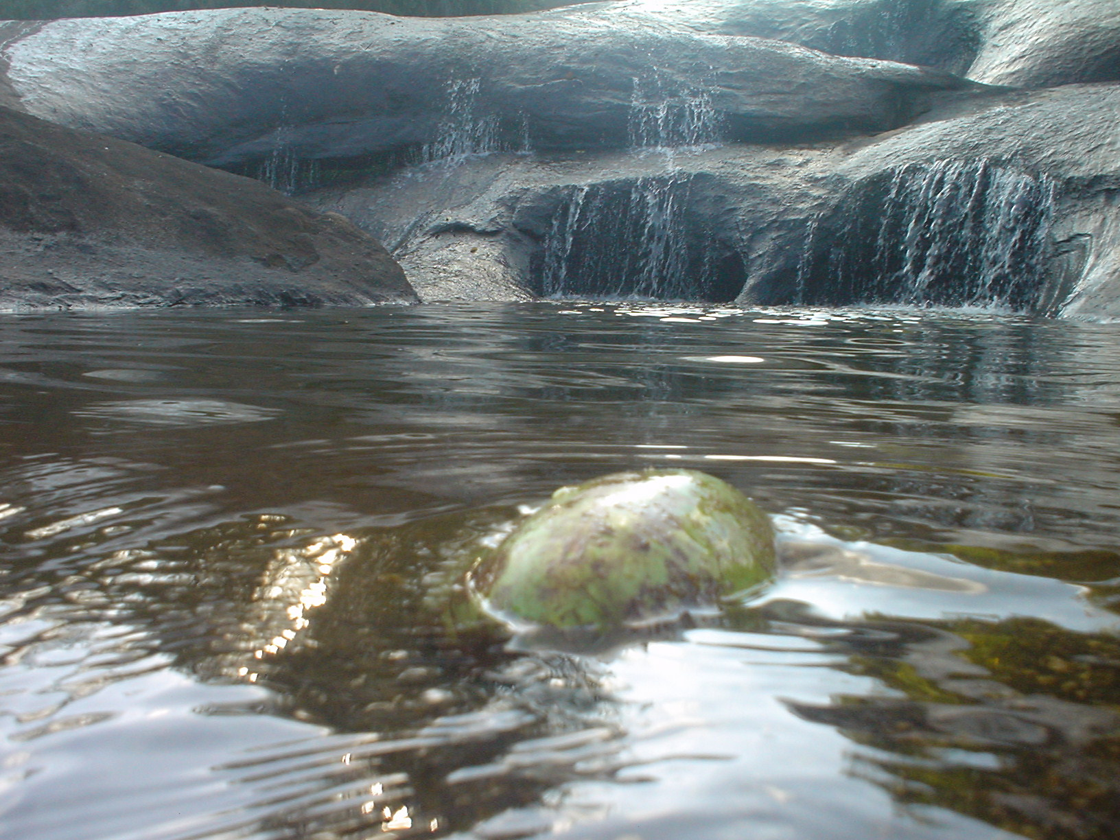 Água de coco